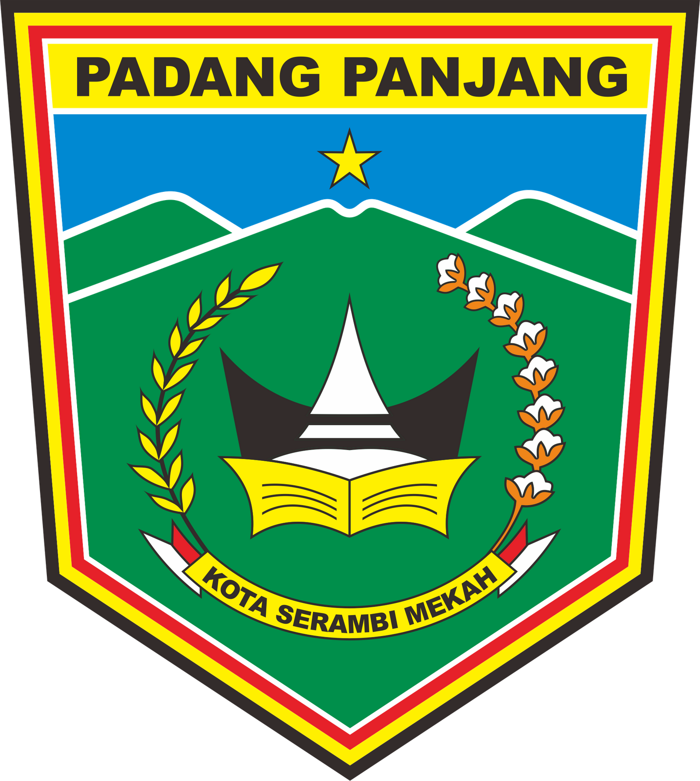 Lambang Kota Padangpanjang